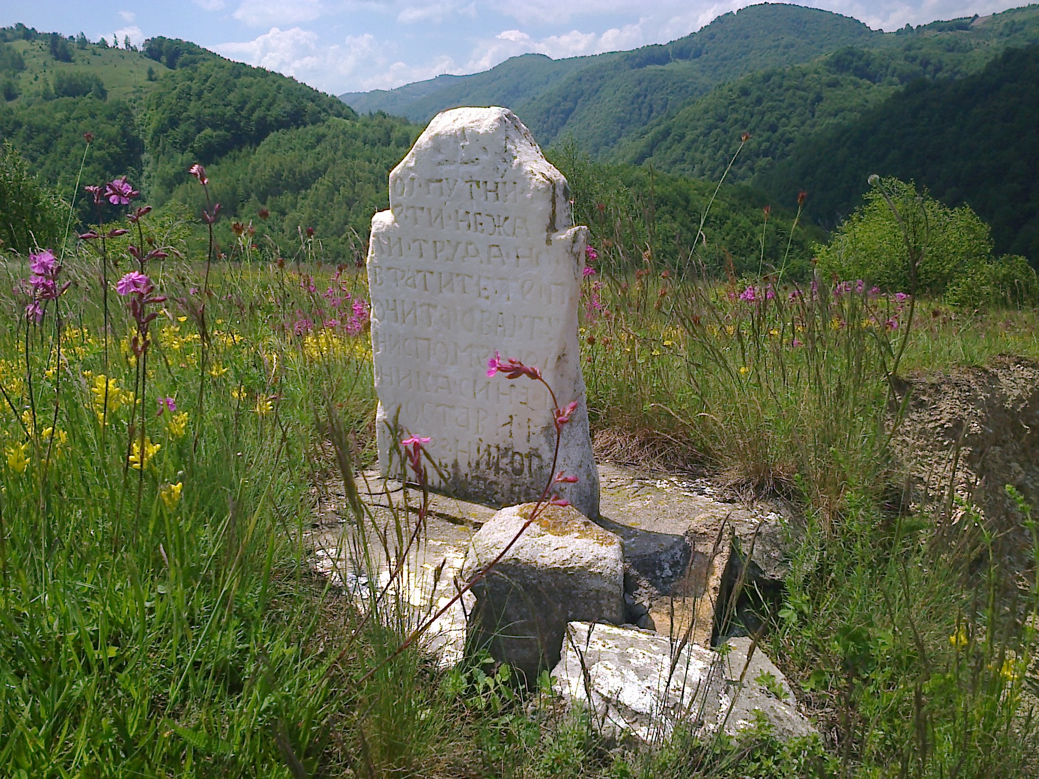 Српски (ћирилица): Крајпуташ